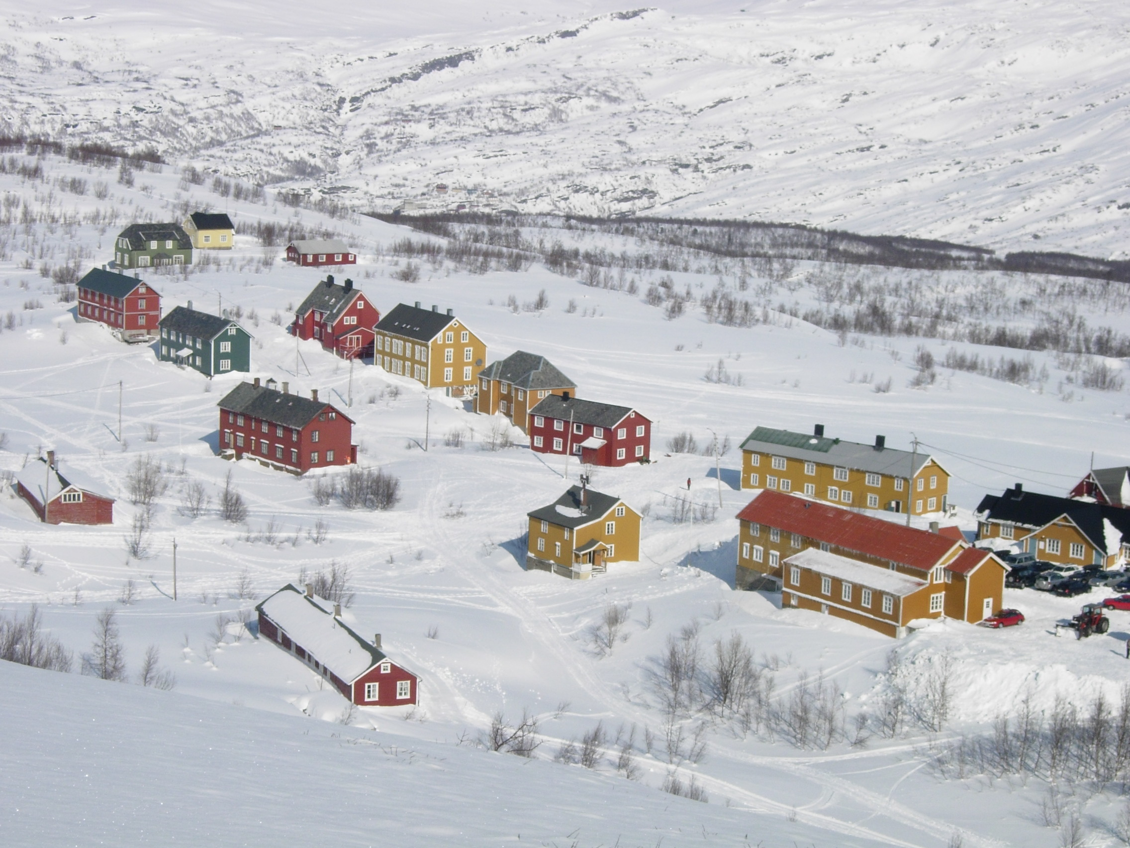 Gruvesamfunnet Jakobsbakken, i Sulitjelma, Fauske municipality (altitude 600 m)